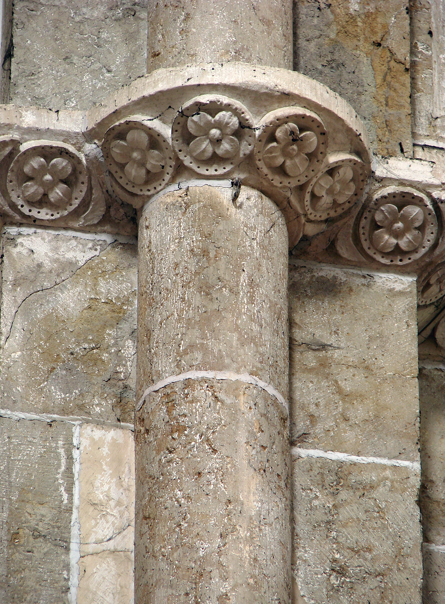 Détail de la frise dans la nef (2ème moitié du 12ème siècle). Basilique Sainte-Marie-Madeleine de Vézelay.